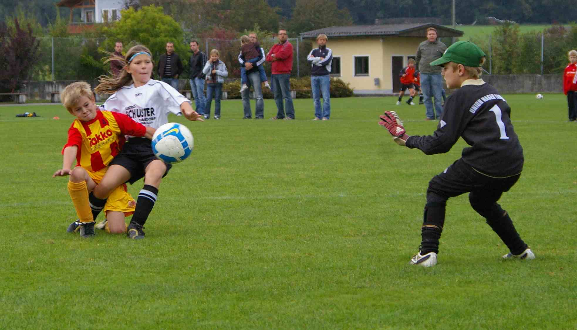 Nachwuchsmeisterschaftsspiel